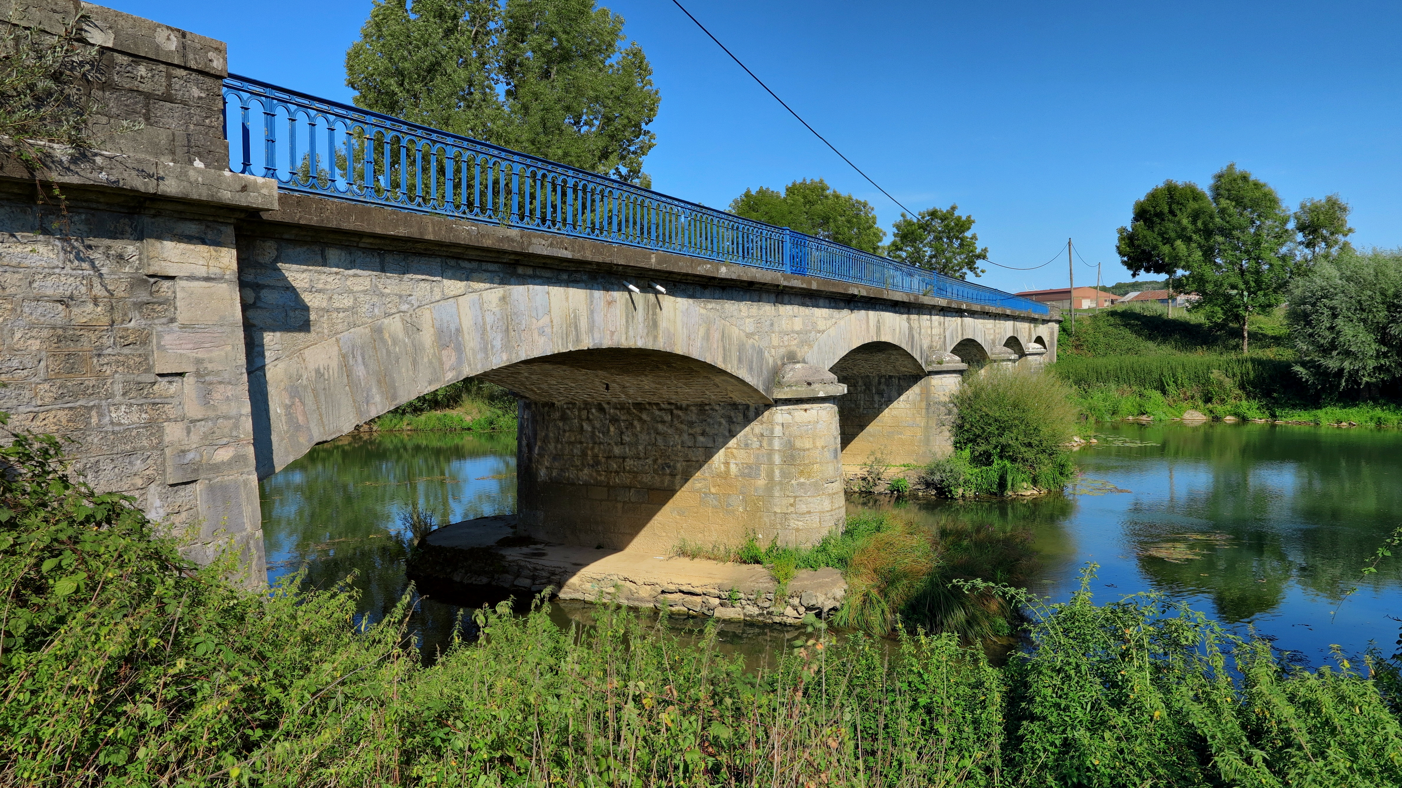 Le pont sur l'Ognon